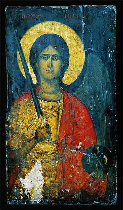 Архангел Михаил. XVIII век, црква Св. Богородица, Долна Белица